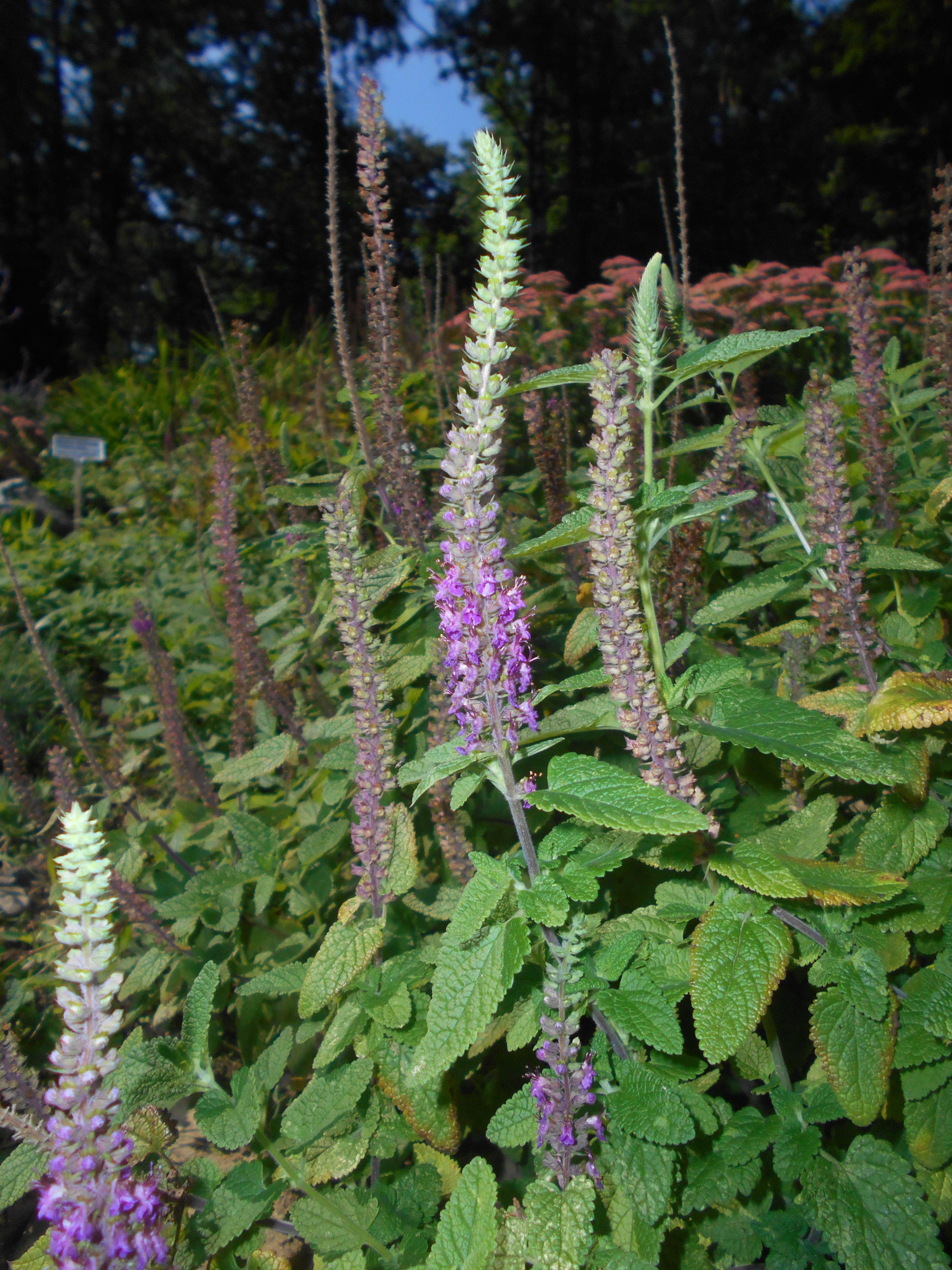 Ożanka kaspijska (Teucrium hircanicum), Ogród Botaniczny UMCS w Lublinie.